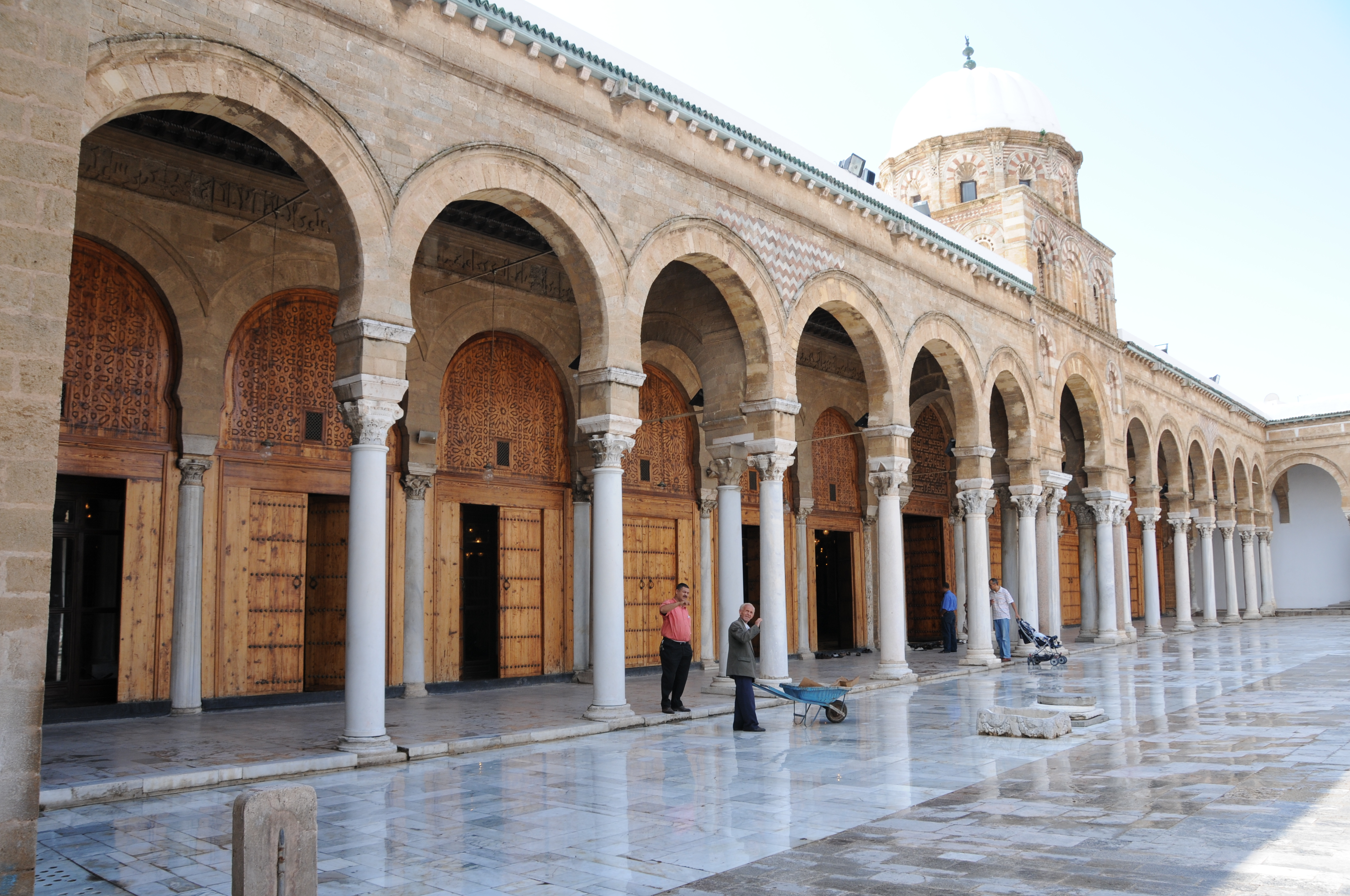 Portes de la salle de prière de la mosquée Zitouna de Tunis (Tunisie)